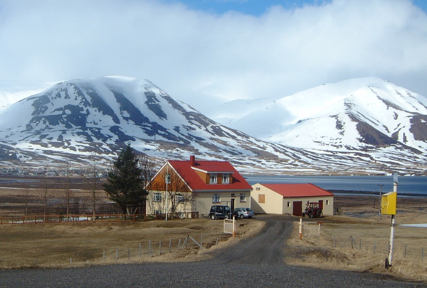 Háls í Svarfaðardal, Dalvík í baksýn, Böggvisstaðafjall, Karlsárfjall